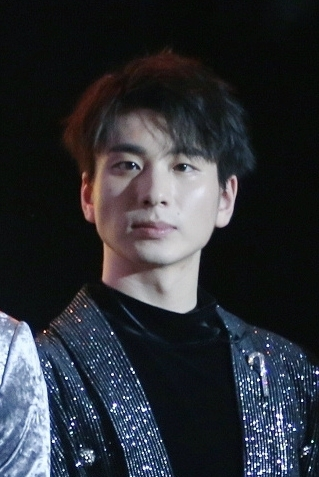 中文（中国大陆）: 2019年3月28日，蔡程昱出席《请回答，歌手》线下活动。